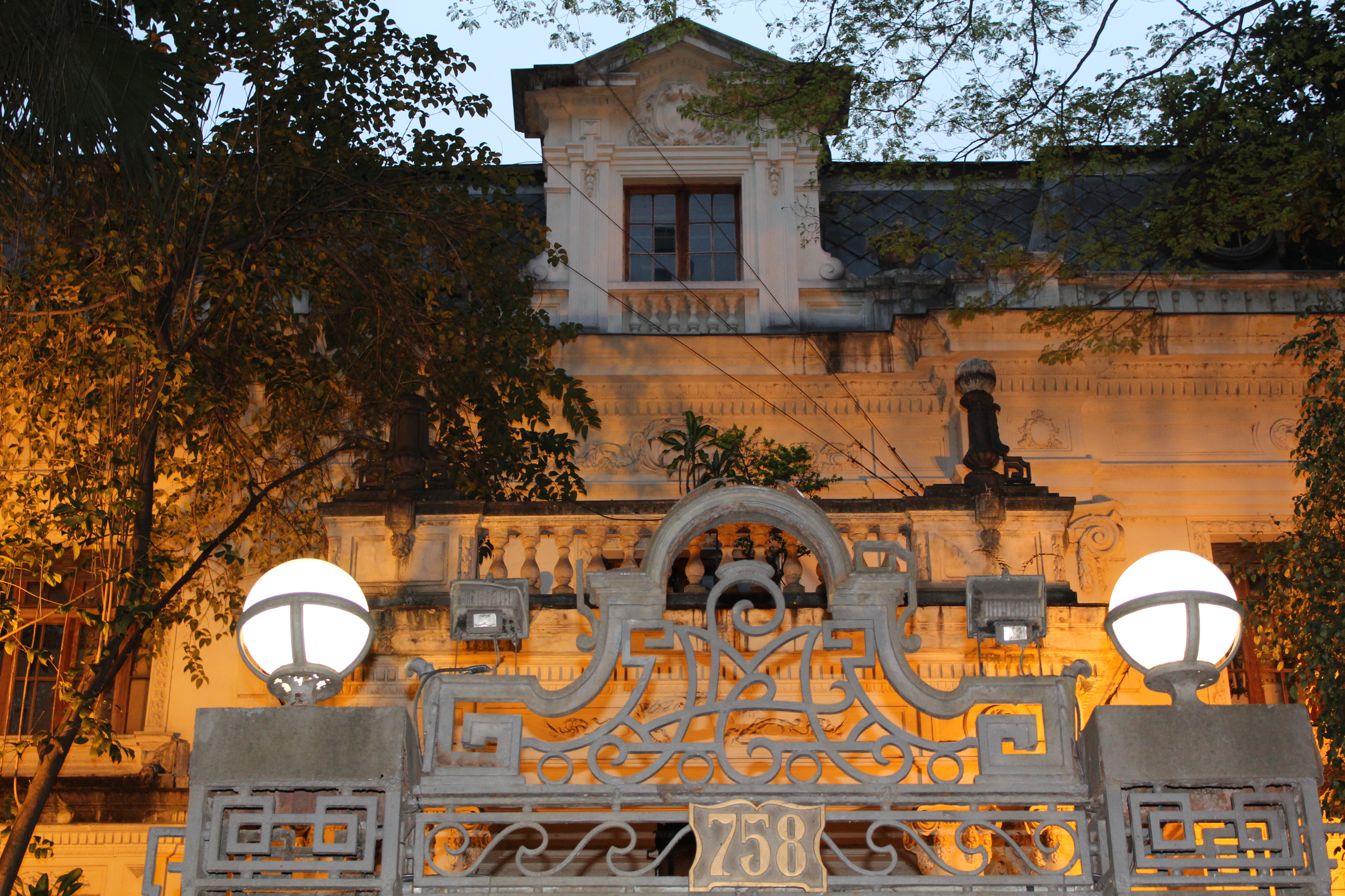 Portão de entrada e varanda principal da Casa de Nhonhô Magalhães, localizada no bairro de Higienópolis, em São Paulo, Brasil.